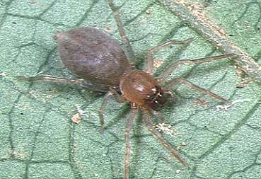 female Clubiona tanikawai from Okinawa.